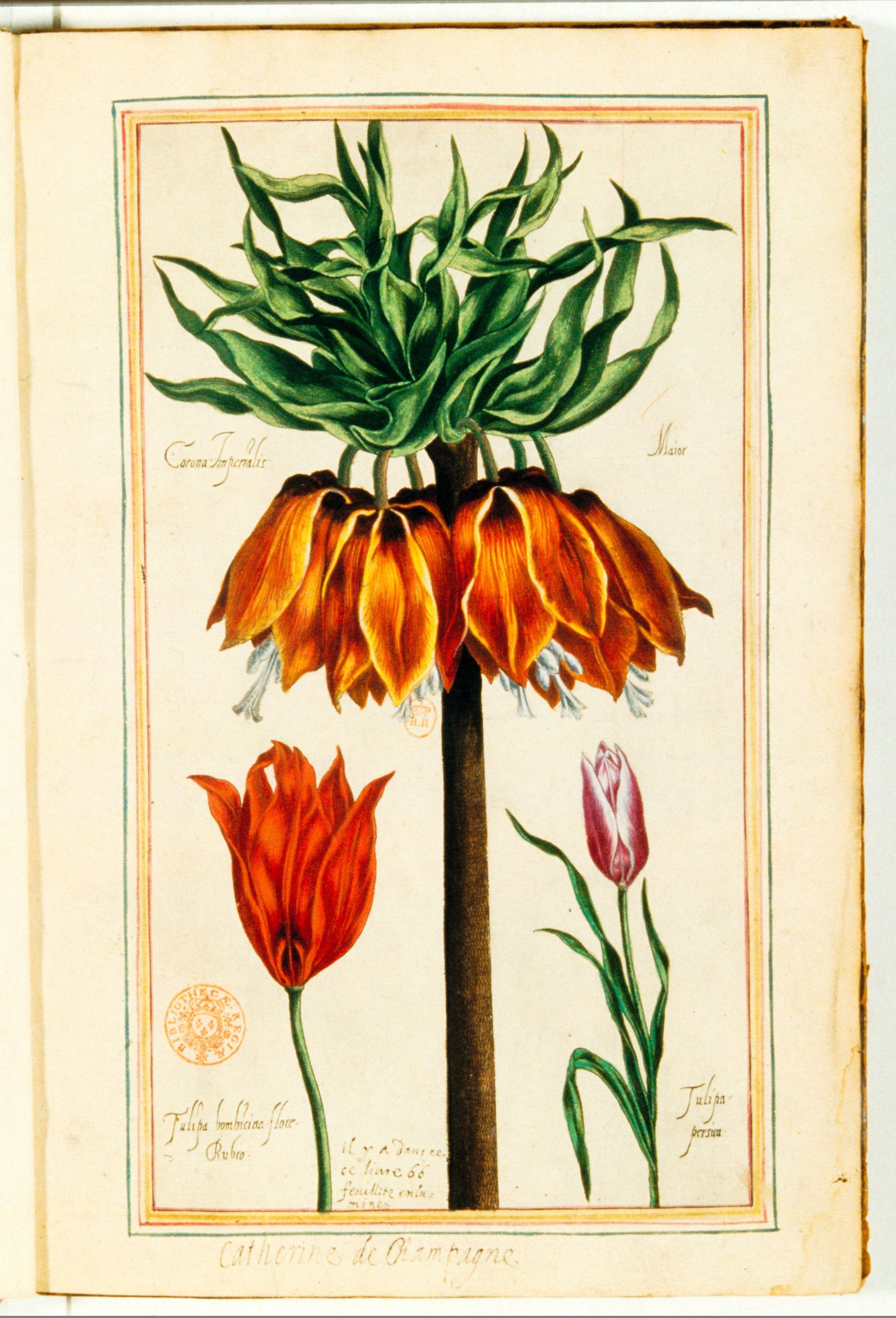 Illustrations de Le Jardin du très chrestien Henry IV par Pierre Valet